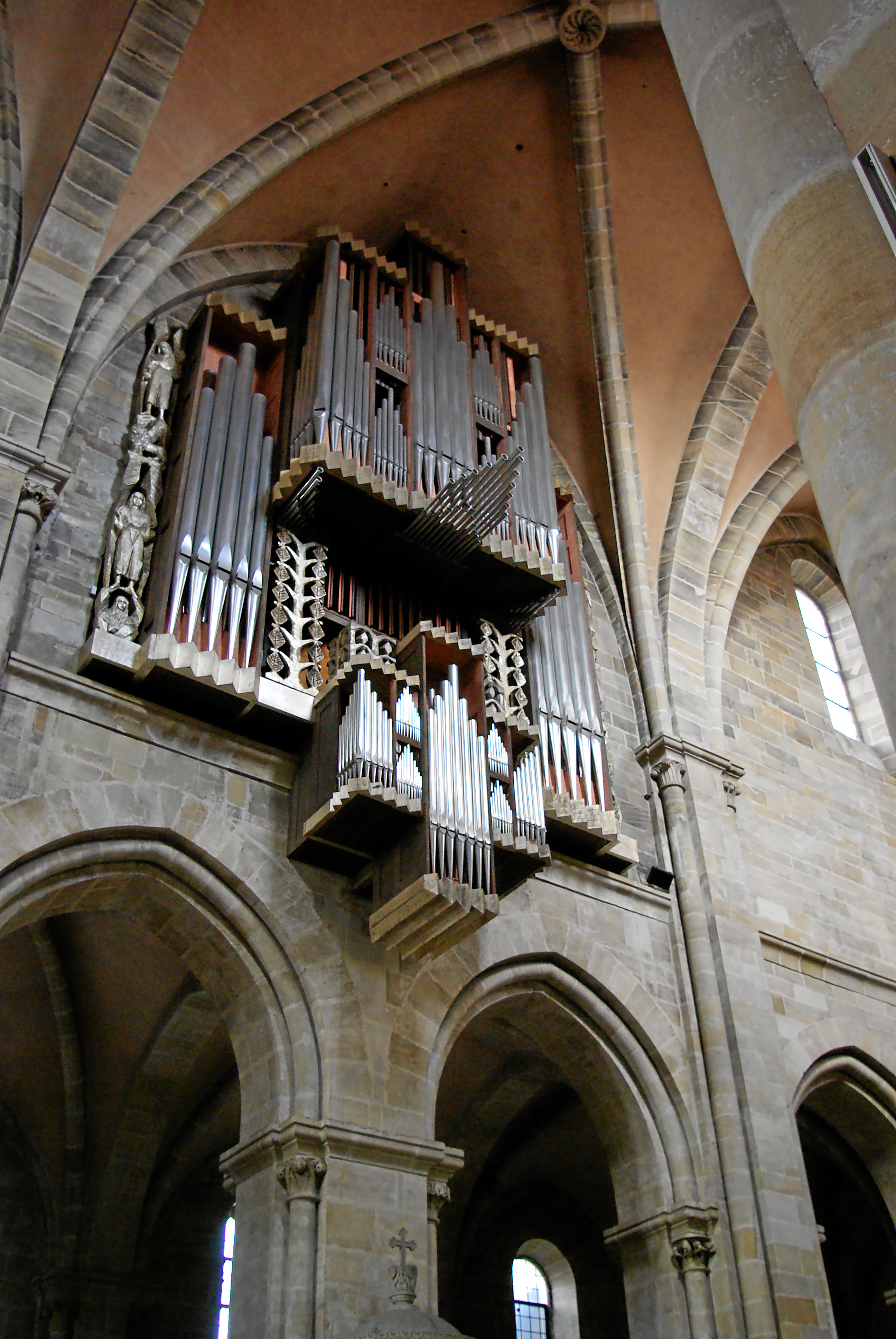 Bamberger Dom Orgel